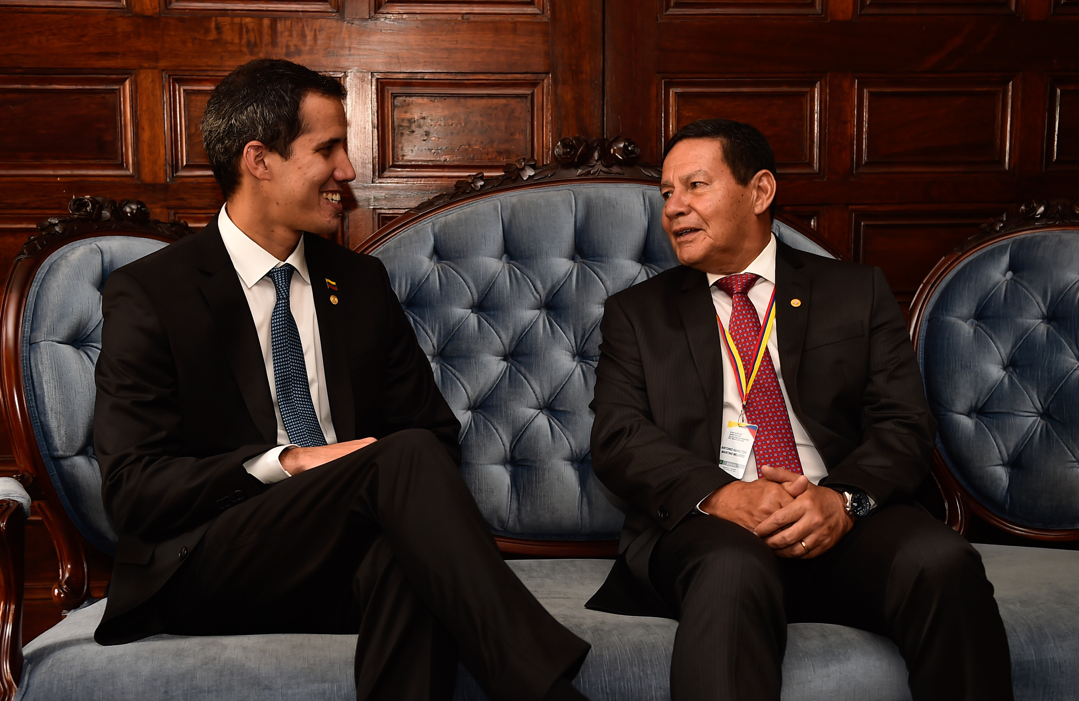 (Bogotá - Colômbia, 25/02/2019) Vice-Presidente da República, General Hamilton Mourão, durante XI Reunião de Ministros das Relações Exteriores do Grupo de Lima Foto: Gabriel Cruz